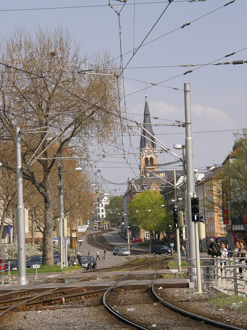 Bilder aus Stuttgart(Stuttgart-) Bad Cannstatt, Wilhelmsplatz; Waiblinger Straße (L 1193), hinten: Turm der Lutherkirche.